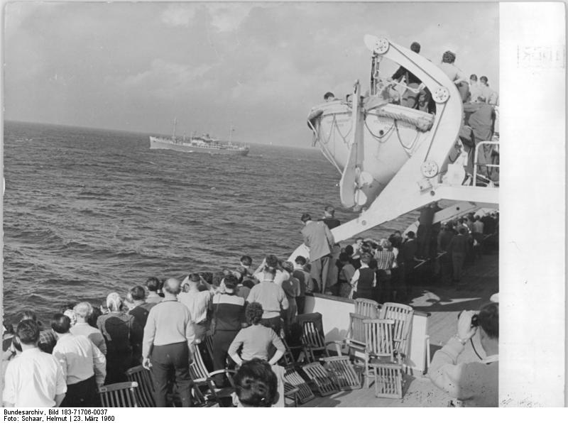 Zentralbild Schaar-23.3.1960 Erste Fahrt des FDGB-Urlauberschiffes "Völkerfreundschaft". Ende Februar 1960 startete das erste FDGB-Urlauberschiff "Völkerfreundschaft" zu einer 27tägigen Ferienreise von Rostock aus ins Mittel- und Schwarze Meer. UBz: Begegnung mit dem Frachter "Heinrich Heine" im Mittelmeer.